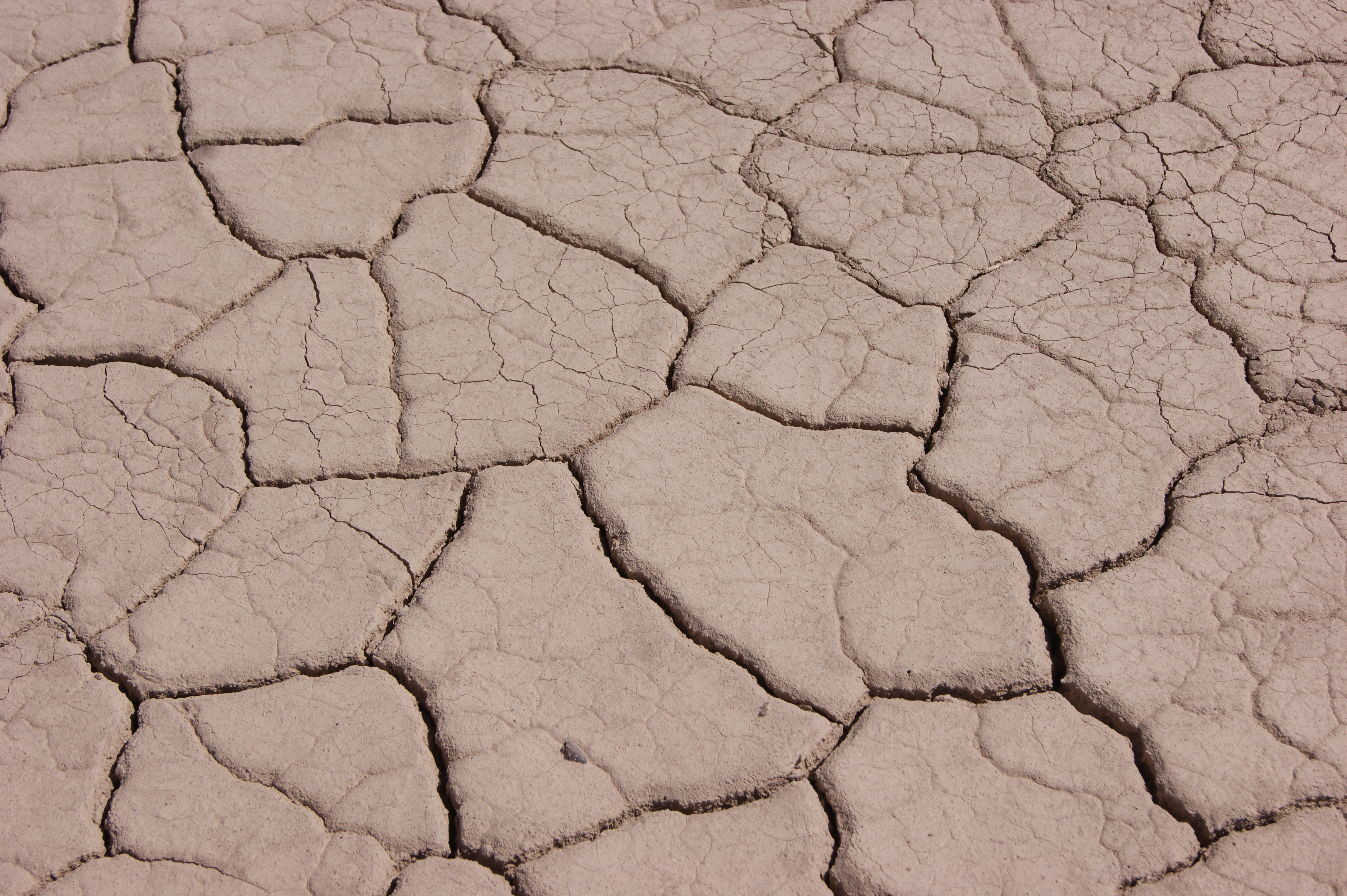 Formación geológica del Barreal Blanco, Pampa del Leoncito, San Juan.